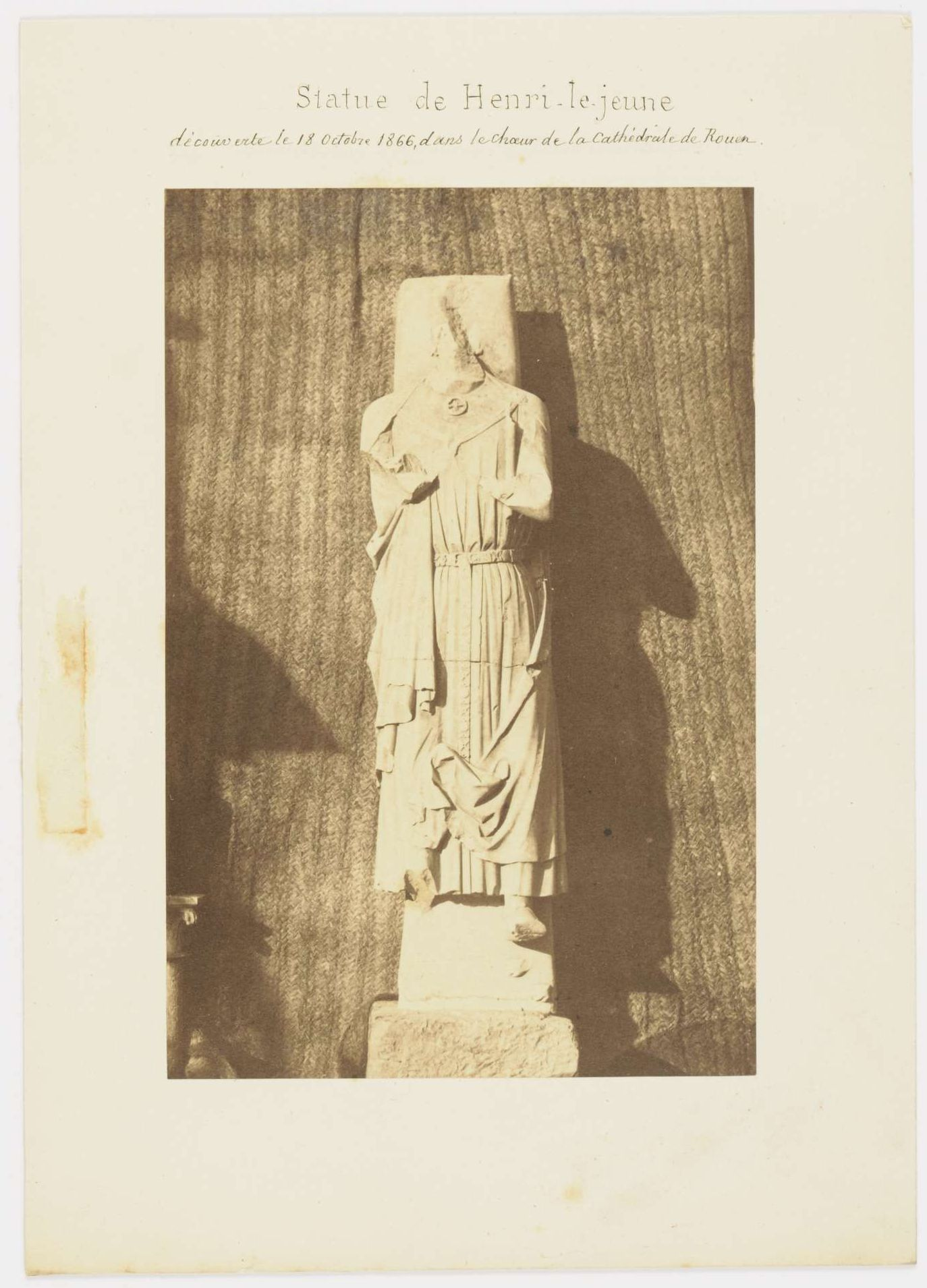 Statues de Henri le Jeune et du duc-roi Henri-Court-Martel : statue de roi à laquelle manque le sommet de la tête, les bras et le pied droit. Photographié par Basset, Rouen. Mention manuscrite à l’encre noire au recto : Statue de Henri le jeune / découverte le 18 octobre 1866, dans le chœur de la cathédrale de Rouen. Échelle : 2 cm / 1 m. Photographie issue des dossiers de travaux de restauration des cathédrales (1802-1912), conservés aux Archives nationales (inventaire et documents numérisés consultables en ligne).